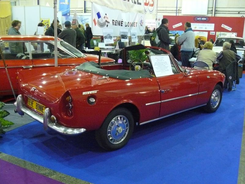 Reims 2012